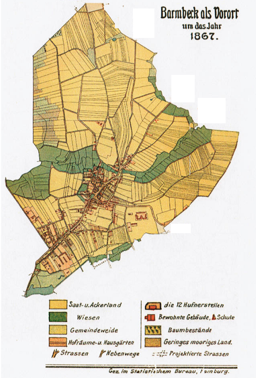 Karte Barmbeks als Vorort um das Jahr 1867. Die Karte umfasst das Gebiet der heutigen Stadtteile Barmbek-Nord, Barmbek-Süd und Dulsberg.